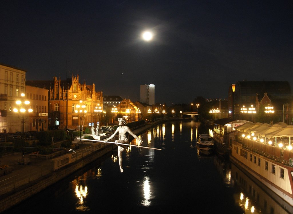 Widok z mostu Sulimy-Kamińskiego w Bydgoszczy